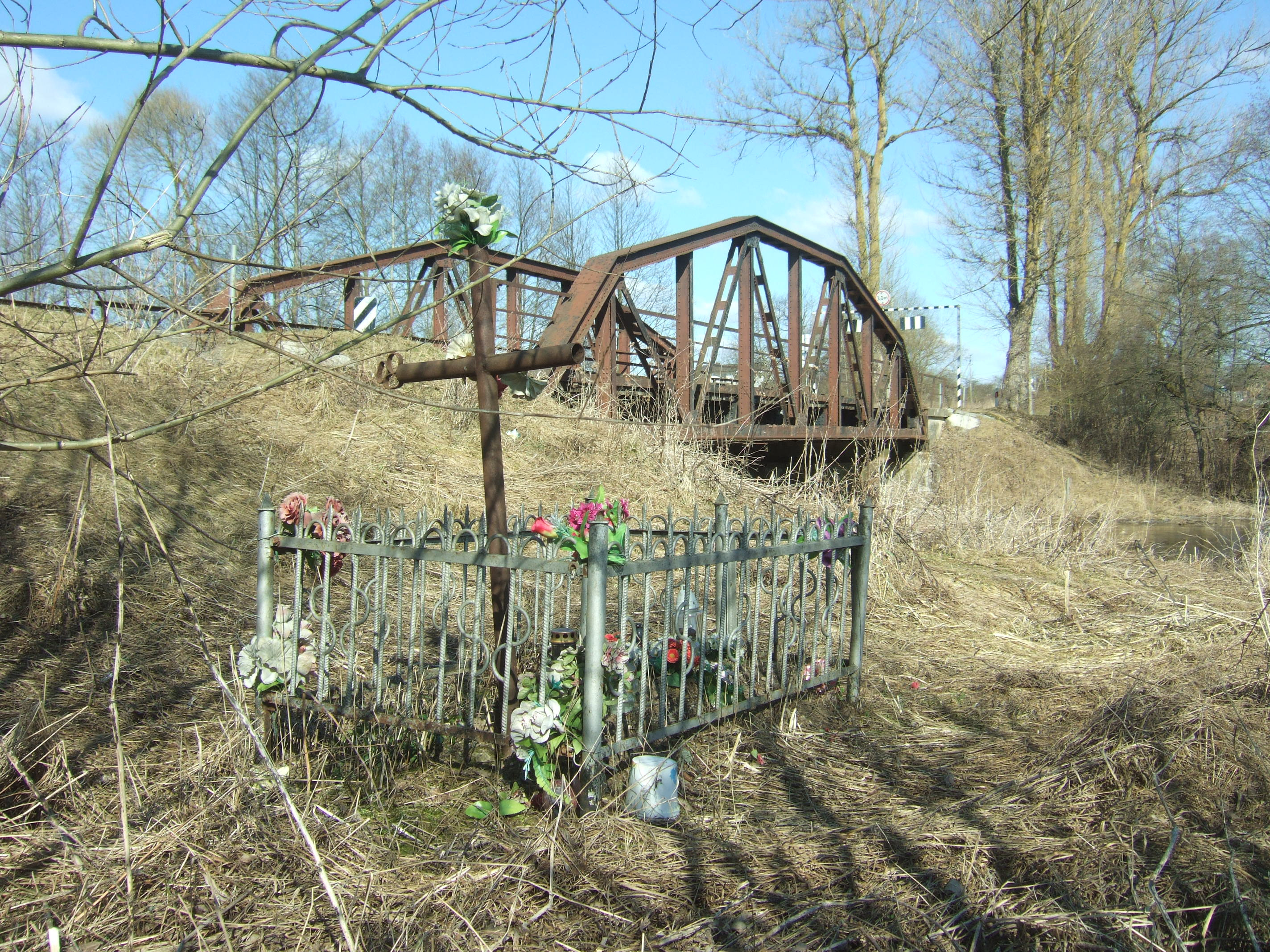 Kapas prie Kazbėjų tilto per Vokę